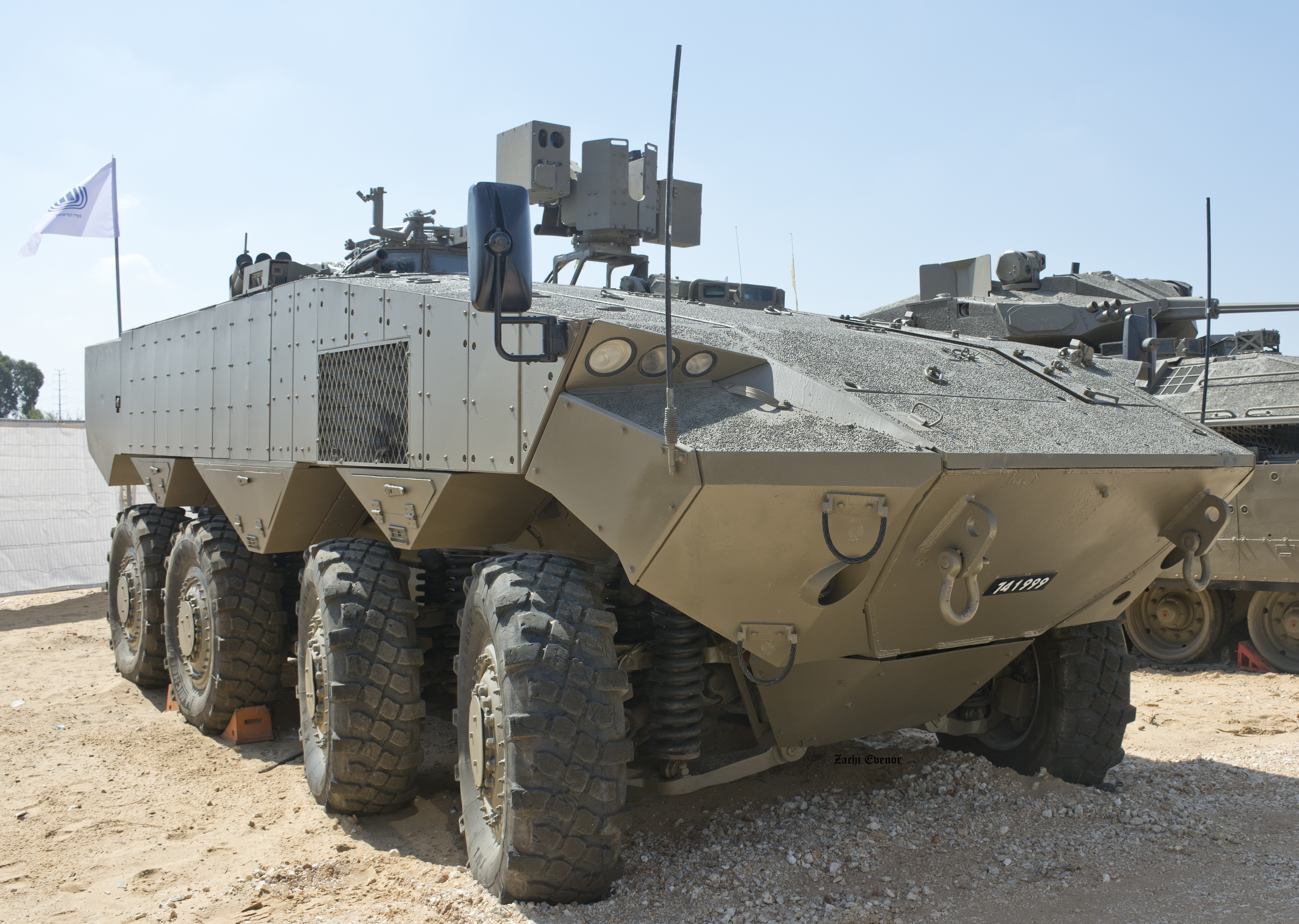 Eytan wheeled armored personnel carrier (WAPC), Our IDF 70, Israel נגמ"ש אופני "איתן", תערוכת צה"ל שלנו 70, ישראל